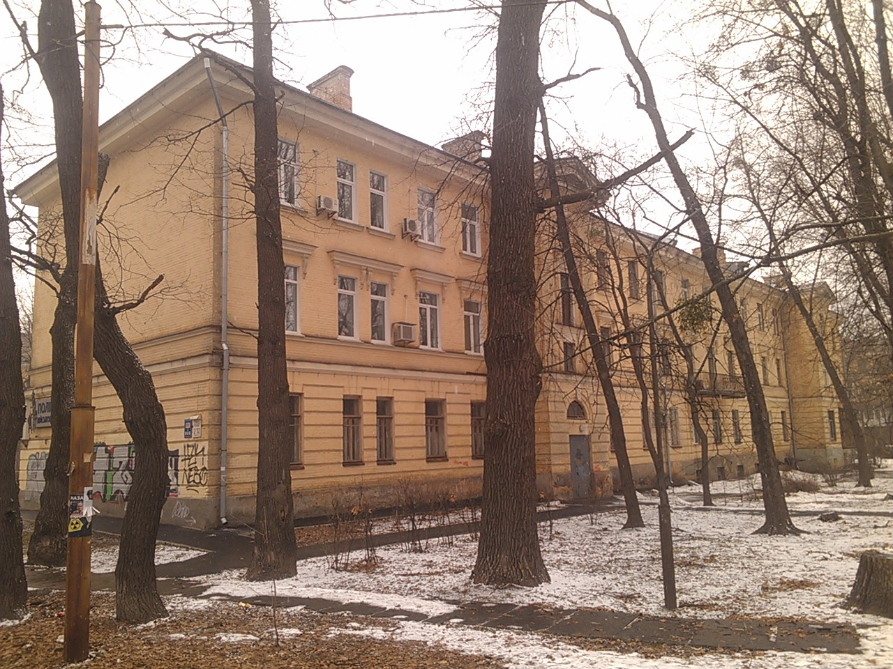 КВВАИУ, Киев, Украина. Жилой корпус 5. Наполовину разрушенный бомбой во время 2-й мировой войны.